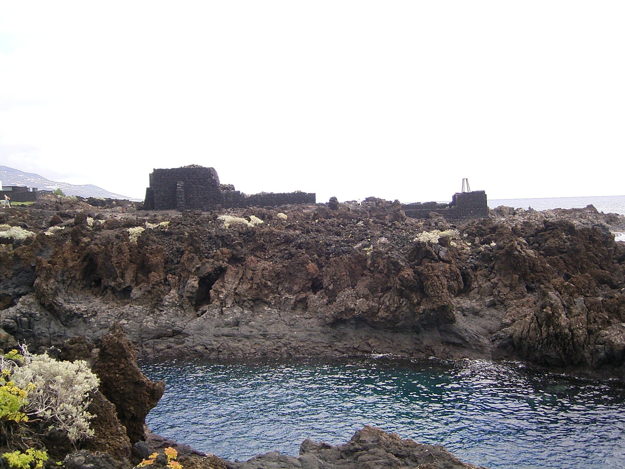 Los Cancajos, La Palma, Canary Islands